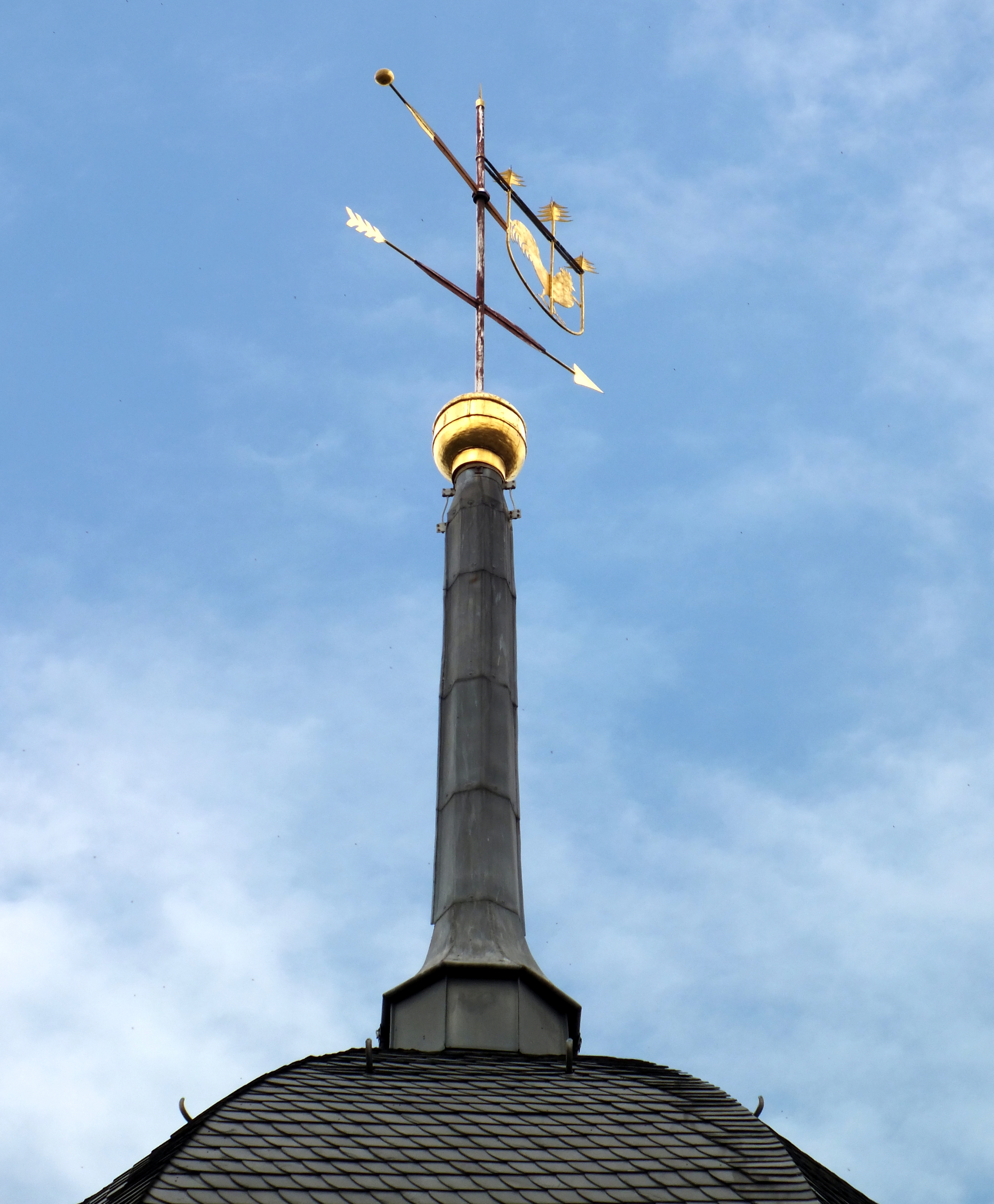 Nicolaikirche Grünhain